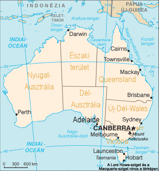 Ausztrália államai és területei, fővárosaikkal. Image:Map of Australia.png magyaírott változata